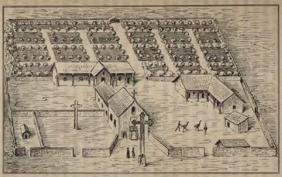 Bild aus P. Florian Baucke, ein deutscher Missionär in Paraguay (1749 – 1768); Freiburg im Breisgau 1908, Herdersche Verlagshandlung